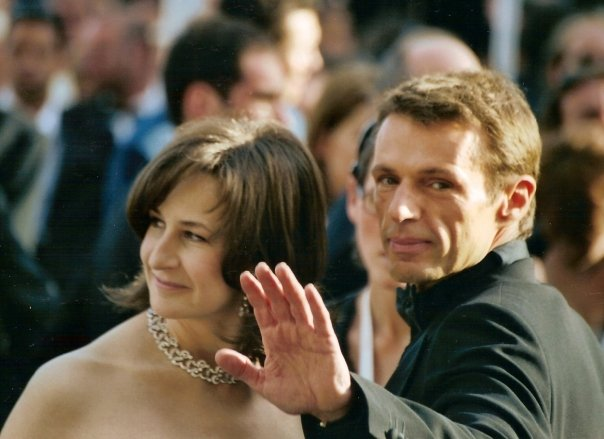 Valérie Lemercier et Lambert Wilson au festival de Cannes.